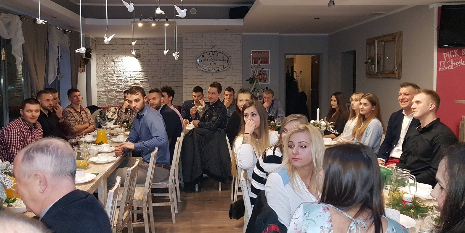 Stargard, 19.12.2017. Wigilia w Spójni